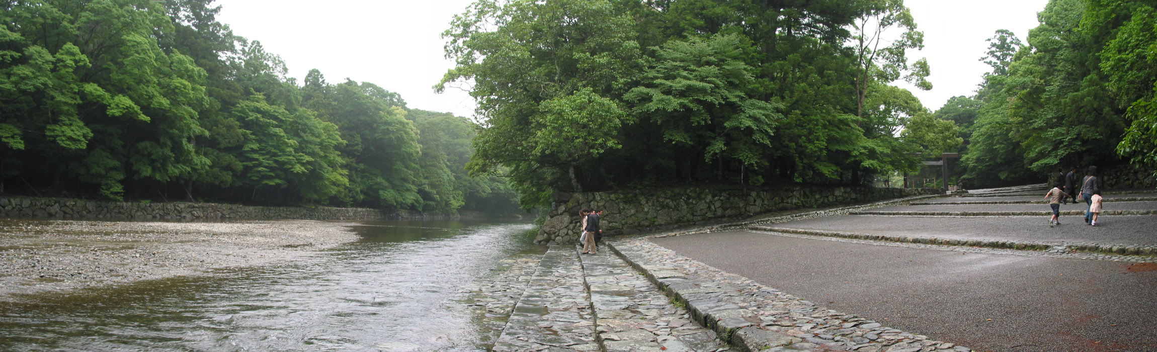 Mitarashiba of Naiku(Ise shrine) 皇大神宮（伊勢神宮内宮）の御手洗場合成・レタッチ済